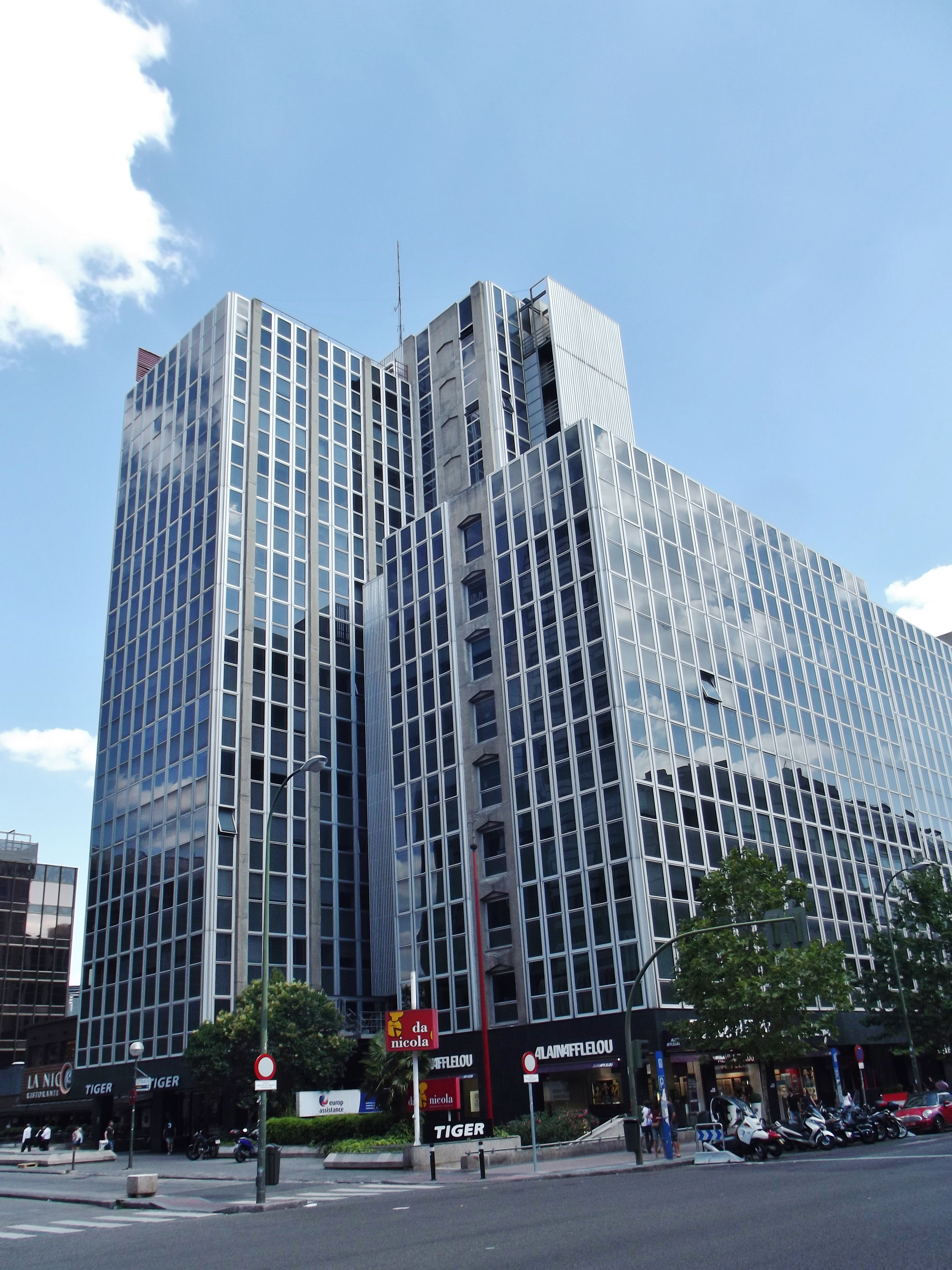 Edificio Trieste, en el número 4 de la calle de Orense, Madrid. Online database: COAM.